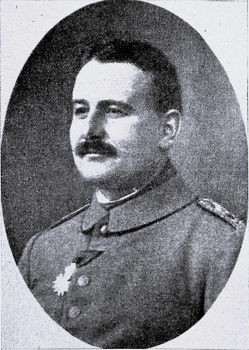 Dr. Hans Hermann Küstermann, Hauptmann der Reserve.